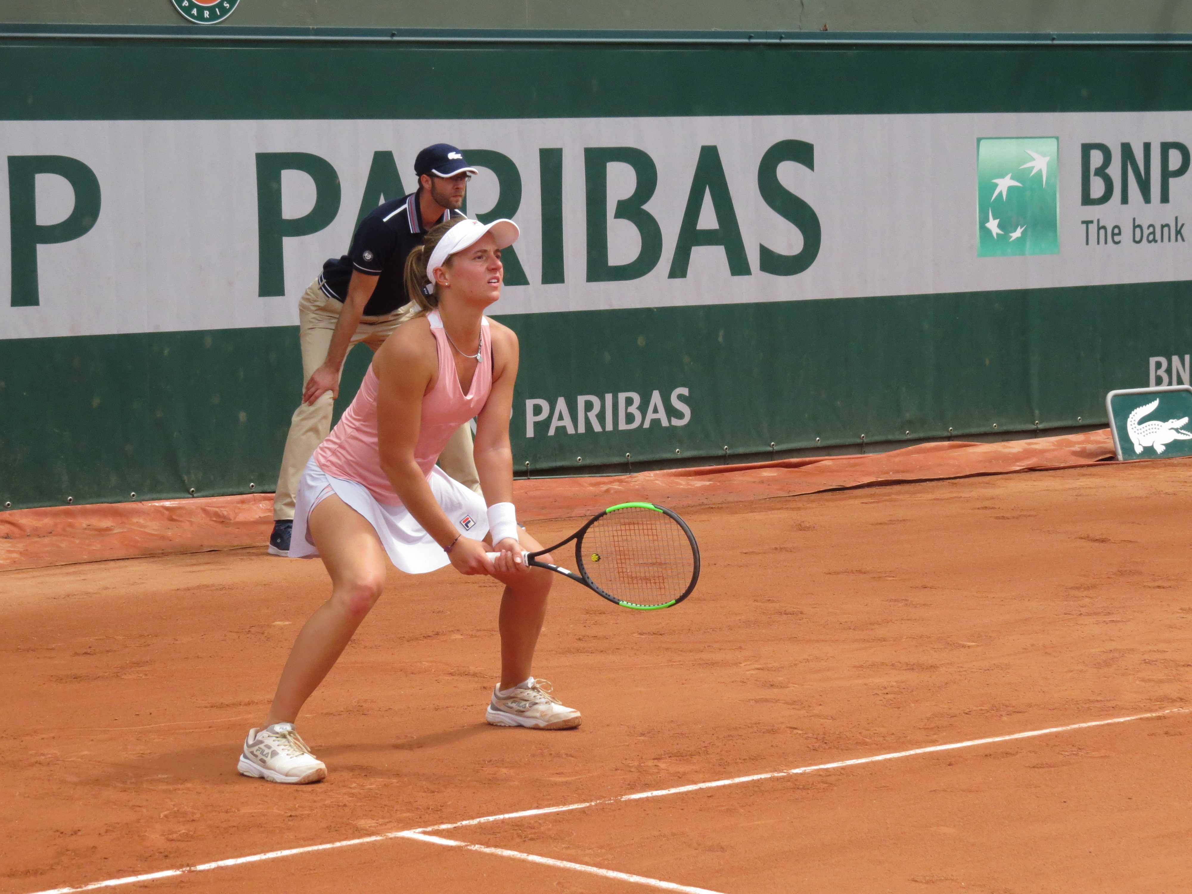 Nadia Podoroska lors de son premier tour des qualifications face à Markéta Vondroušová (court n°13)